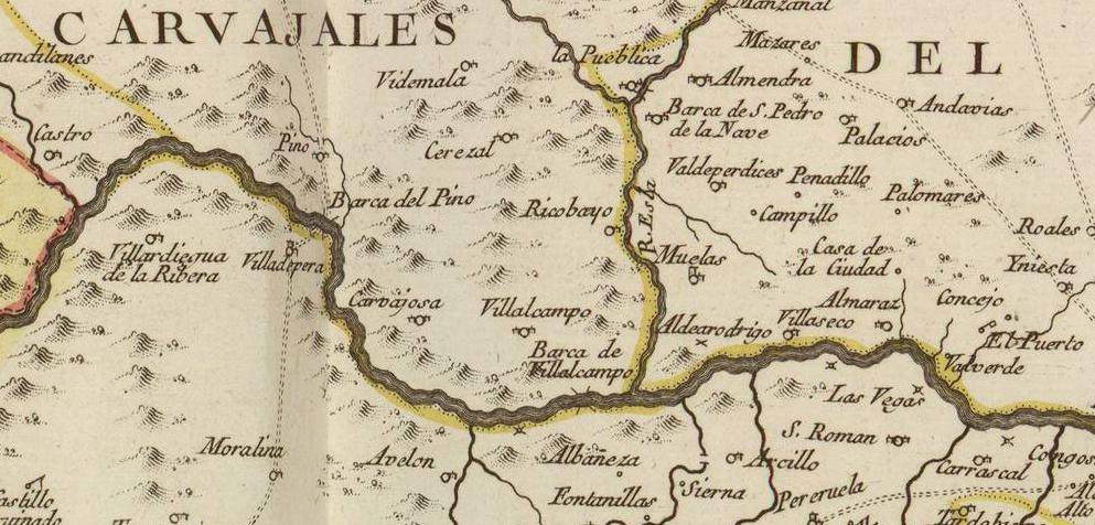 Detalle del sur del partido de Carbajales, del suroeste del Pan y del norte de Sayago en 'Mapa de la Provincia de Zamora. Comprehende los partidos del Pan, el del Vino, el de Sayago, el de Carvajales, el de Alcañizas, el de Mombuey y el de Tábara' (1773).